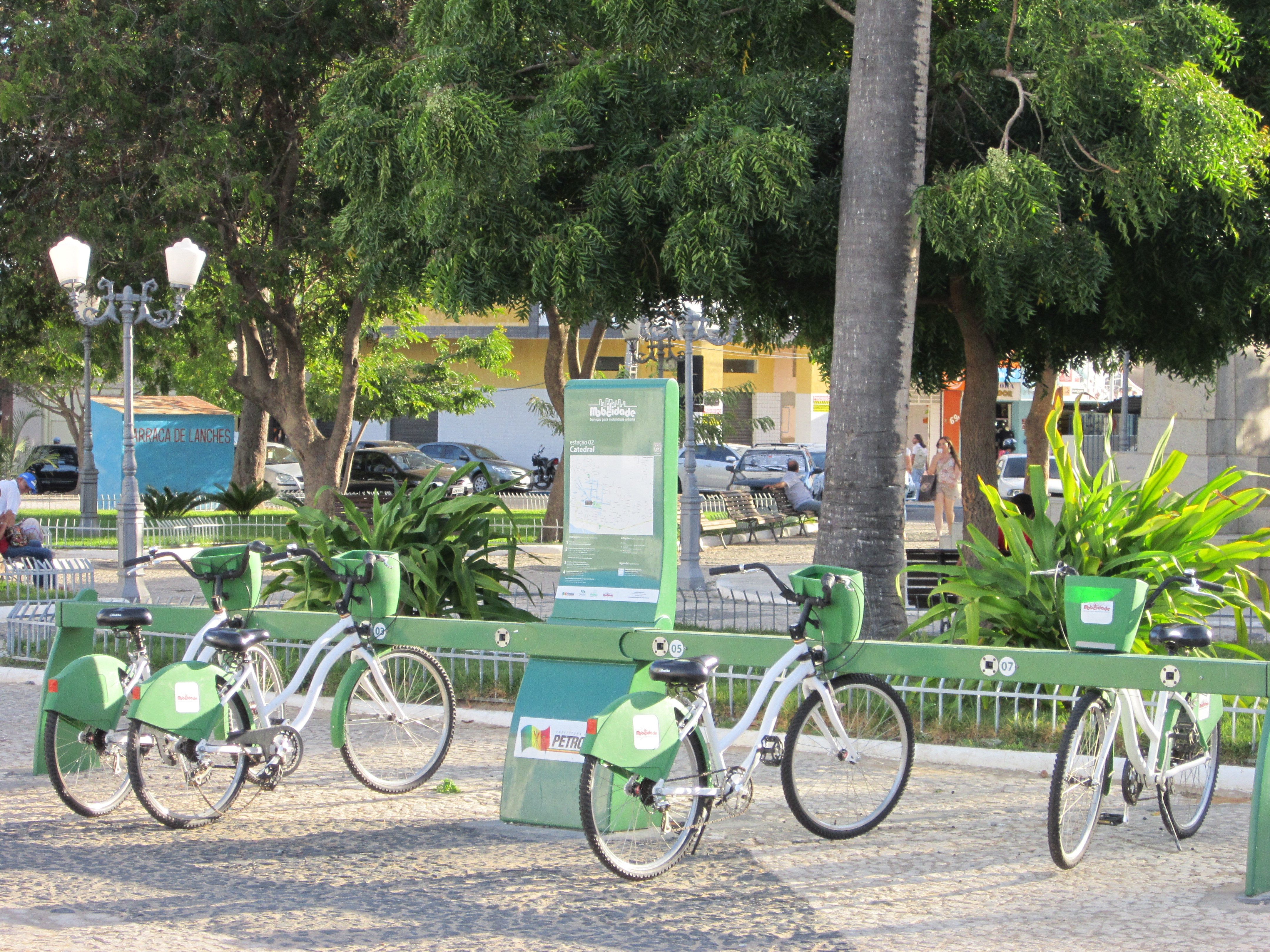 Um dos pontos de aluguel de bicicleta da cidade de Petrolina, Pernambuco, Brasil.